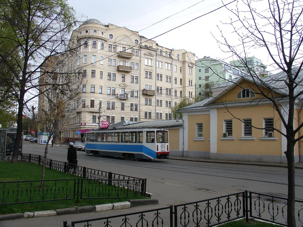 Novokuznetskaya Street, 1 (foreground); Klimentovsky, 4 by Ernst Nirnsee